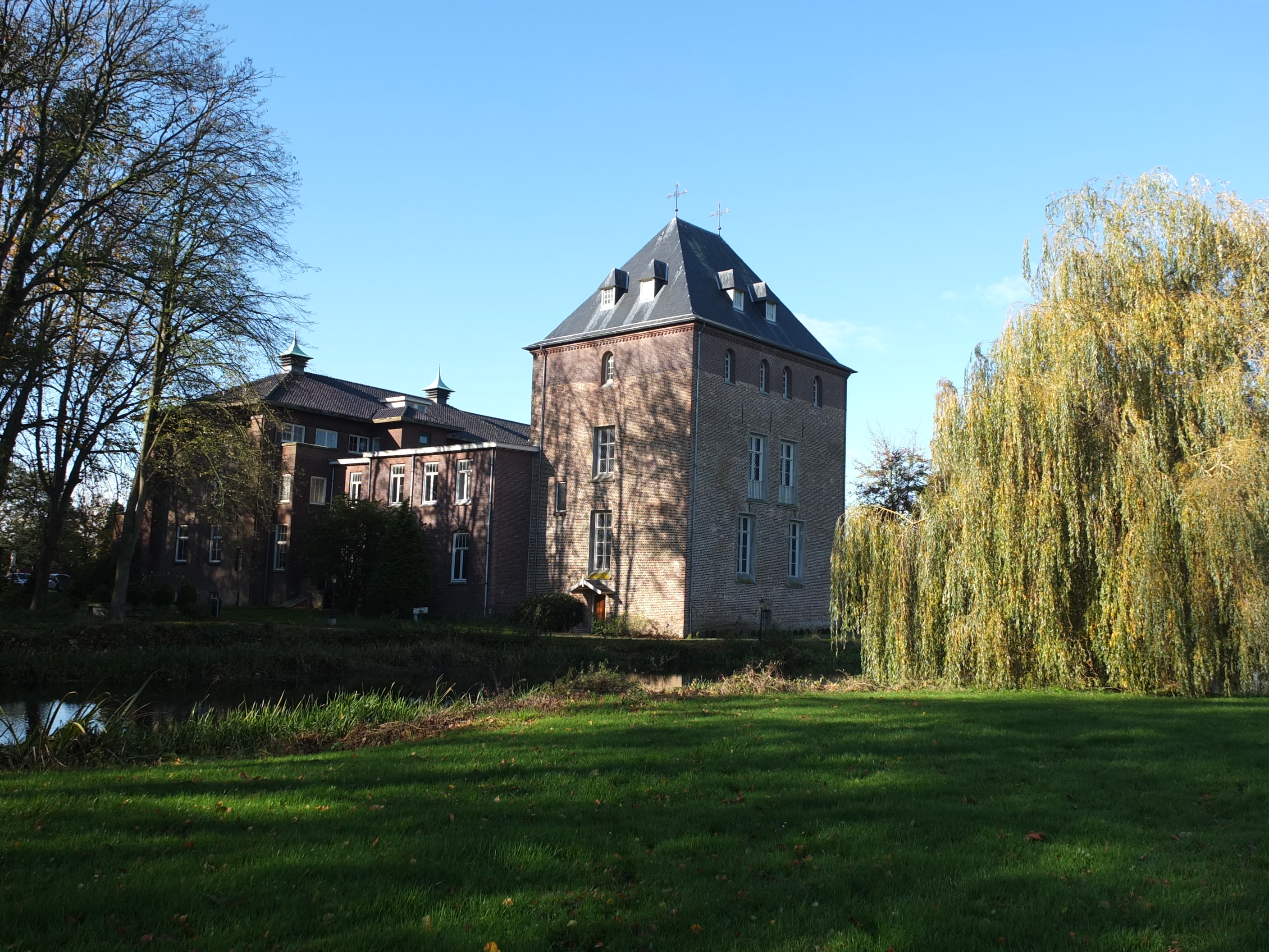 Abdij Mariënkroon